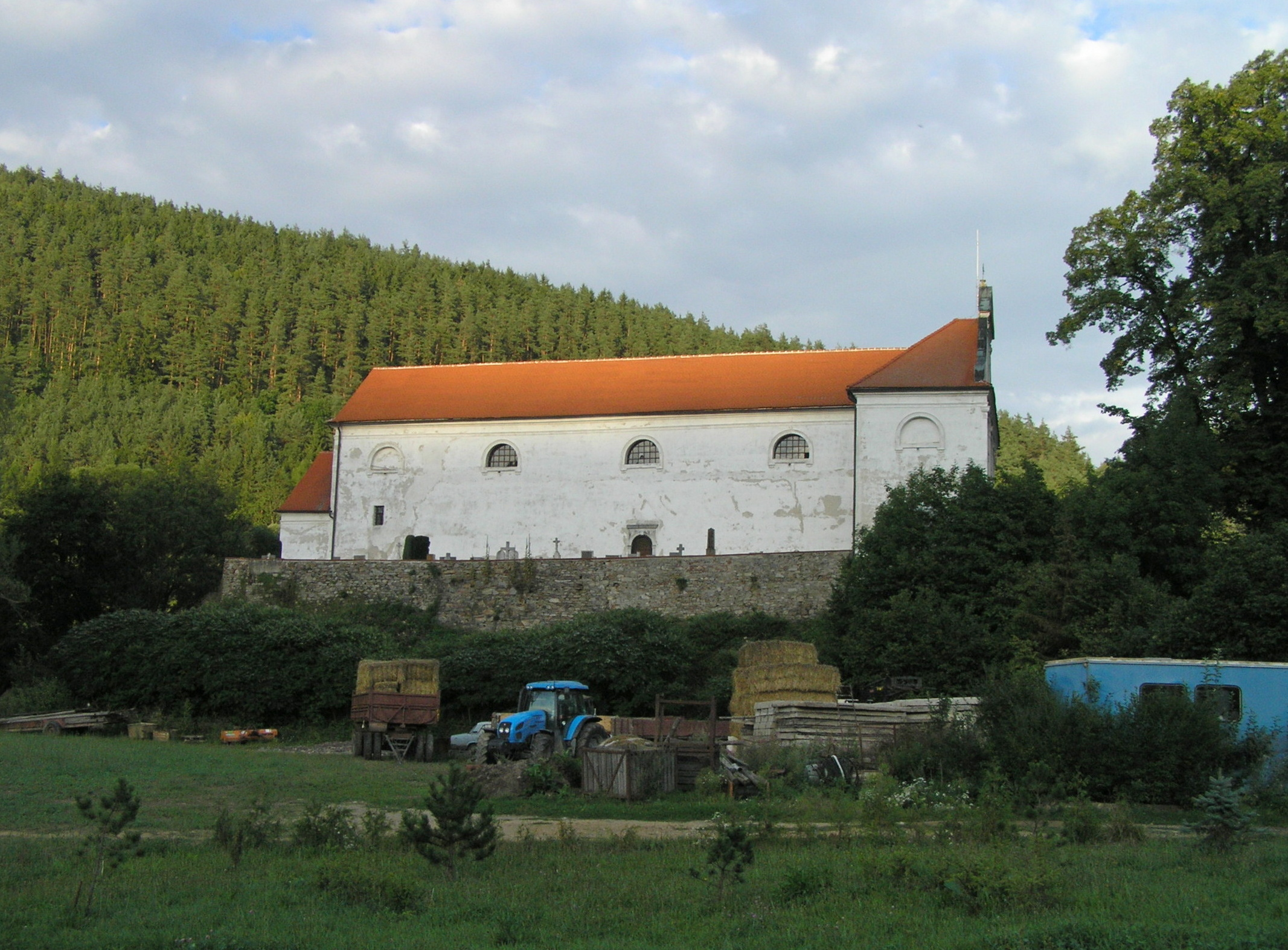 Kostel Nanebevzetí P. Marie